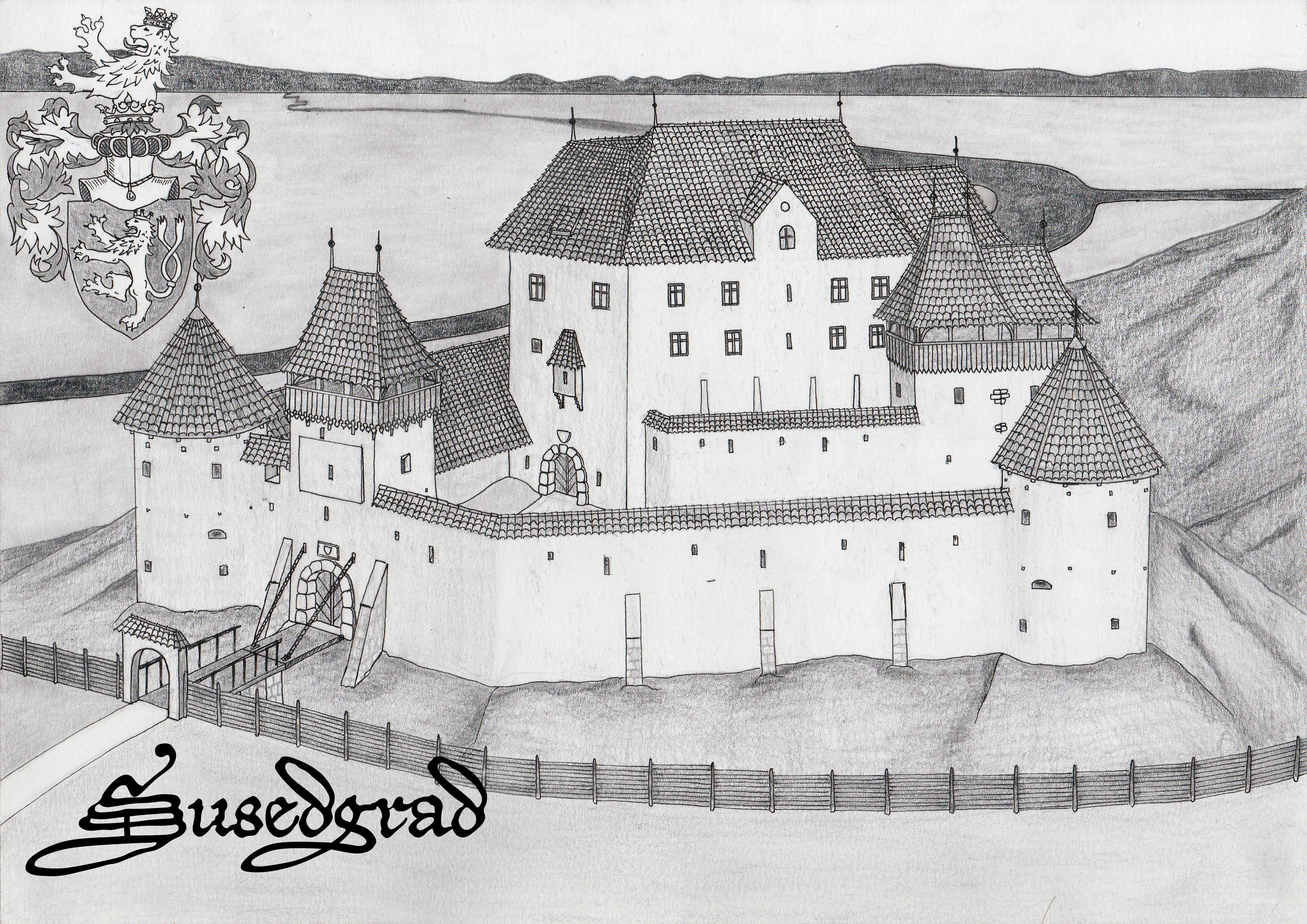 Poskus rekonstrukcije gradu Susedgrad pri Zagrebu na Hrvaškem